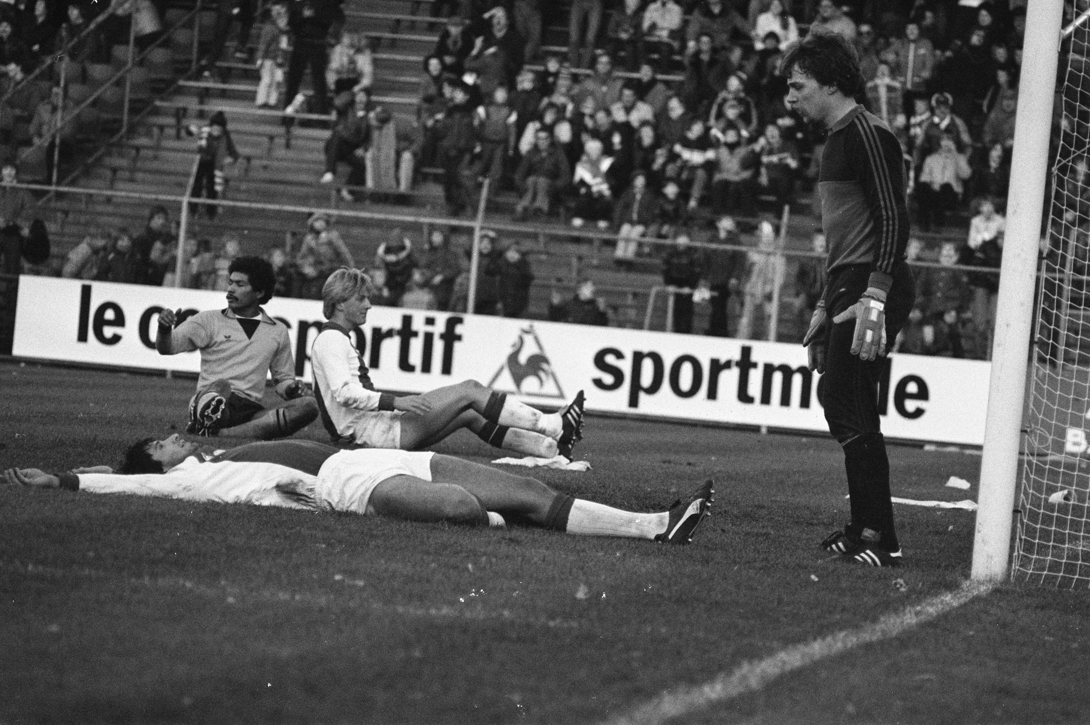 Collectie / Archief : Fotocollectie Anefo Reportage / Serie : [ onbekend ] Beschrijving : Ajax tegen FC Twente 5-3, La Ling op grond na gemiste kans, links zijn vaste bewaker Zondervan en rechts Kieft Datum : 30 november 1980 Trefwoorden : sport, voetbal Persoonsnaam : Kieft, La Ling, Tscheu Instellingsnaam : FC Twente Fotograaf : Bogaerts, Rob / Anefo Auteursrechthebbende : Nationaal Archief Materiaalsoort : Negatief (zwart/wit) Nummer archiefinventaris : bekijk toegang 2.24.01.05 Bestanddeelnummer : 931-1798